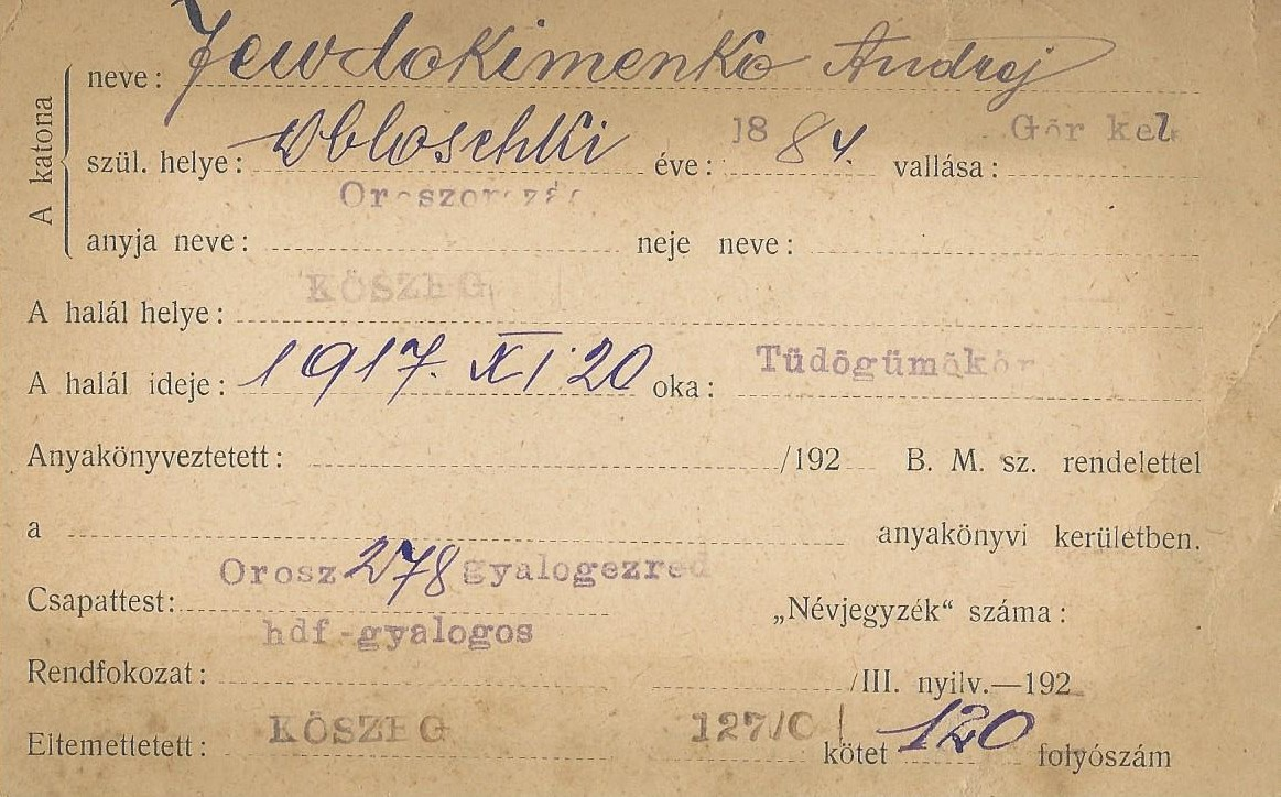 Посвідка про смерть Українця, вояка РІА - Андрія Євдокименка.